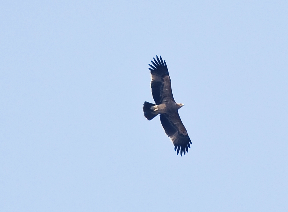 Flugbild eines jungen Kaiseradlers ,Seewinkel 20009